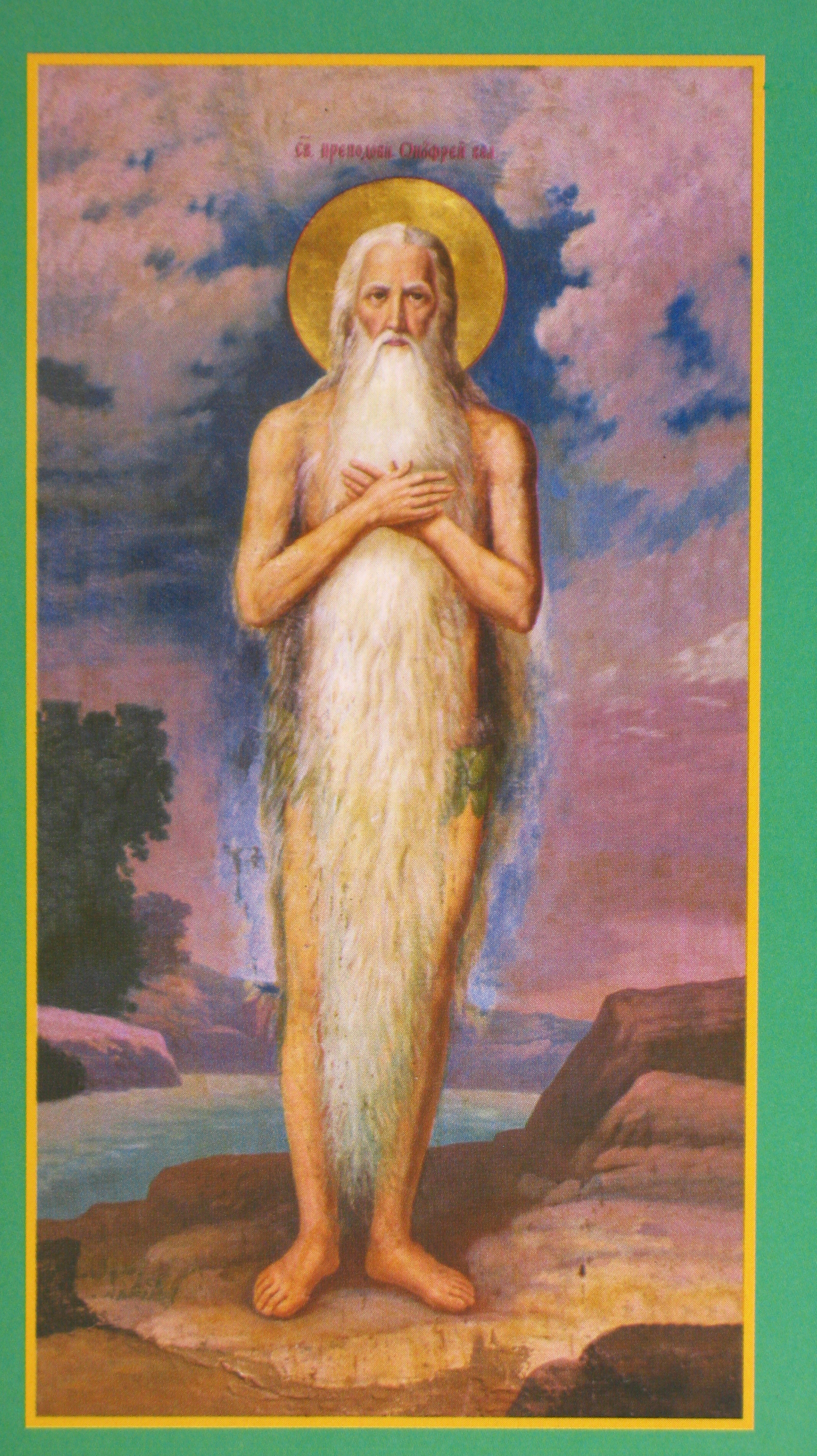 "Св. преподобн. Онуфрей Вел." Русская чудотворная икона Онуфрия Великого, царевича перс[идс]кого (в полный рост). Преображенский женский монастырь, село Головчинцы Хмельницкой и Староконстантиновской епархии РПЦ.